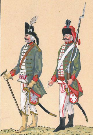 47. Chorągiew węgierska Buławy Wielkiej Koronnej